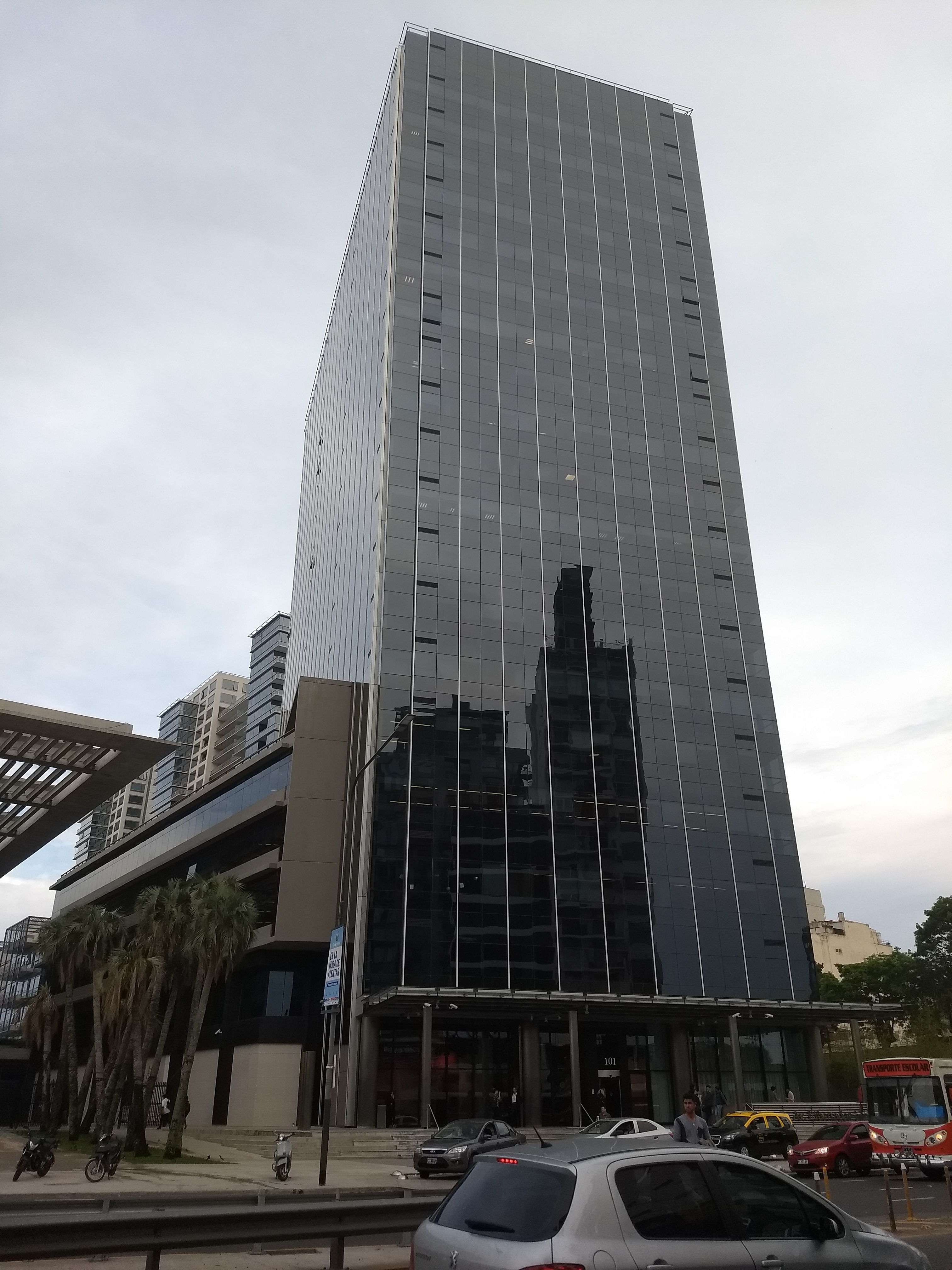 La torre sur, un edificio de oficinas en avenida del Libertador 101, parte del complejo urbano Al Río en Vicente López, provincia de Buenos Aires. El diario La Nación ocupa algunos pisos de este edificio.